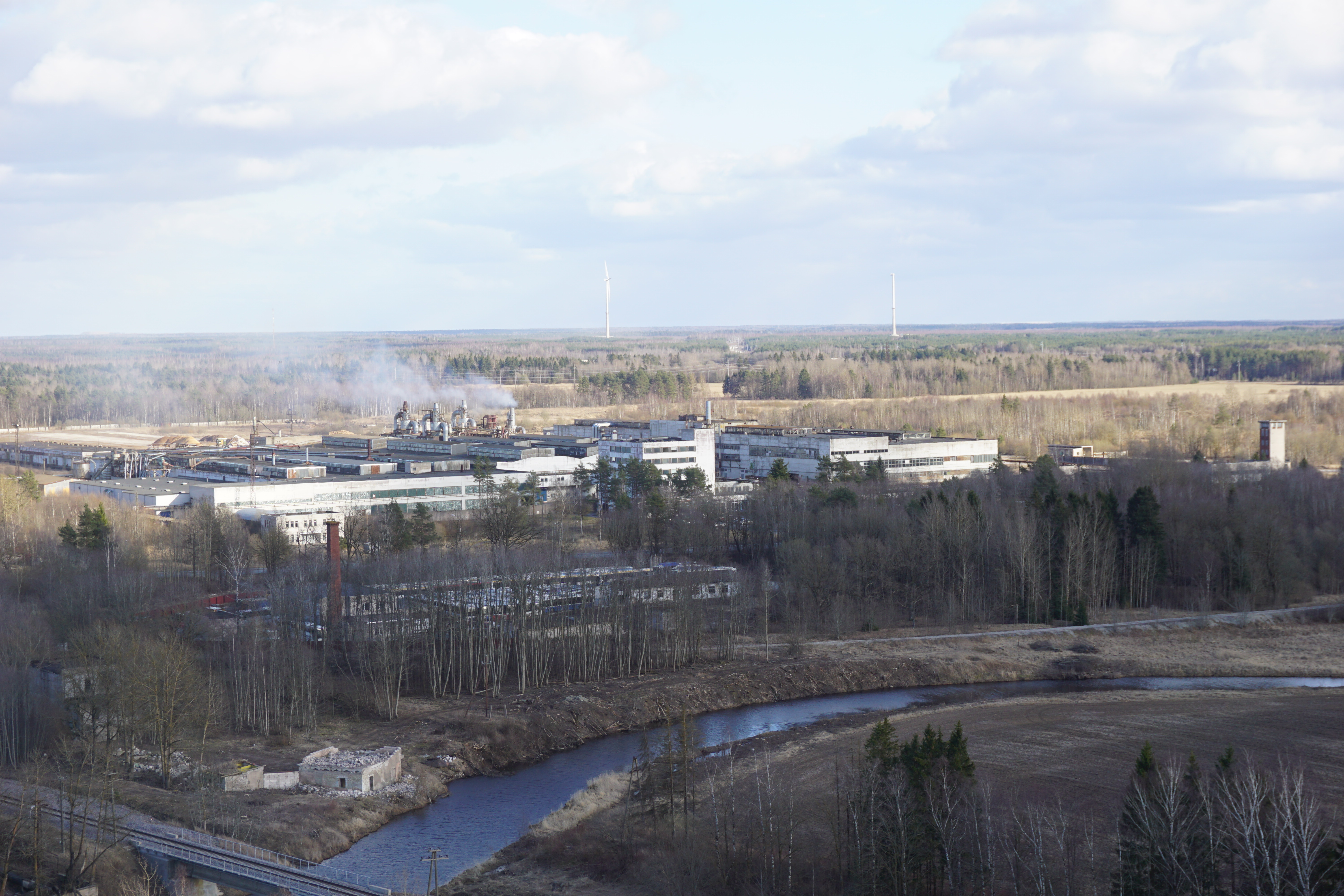 AS Repo Vabrikud tehasehoone tuhamäelt